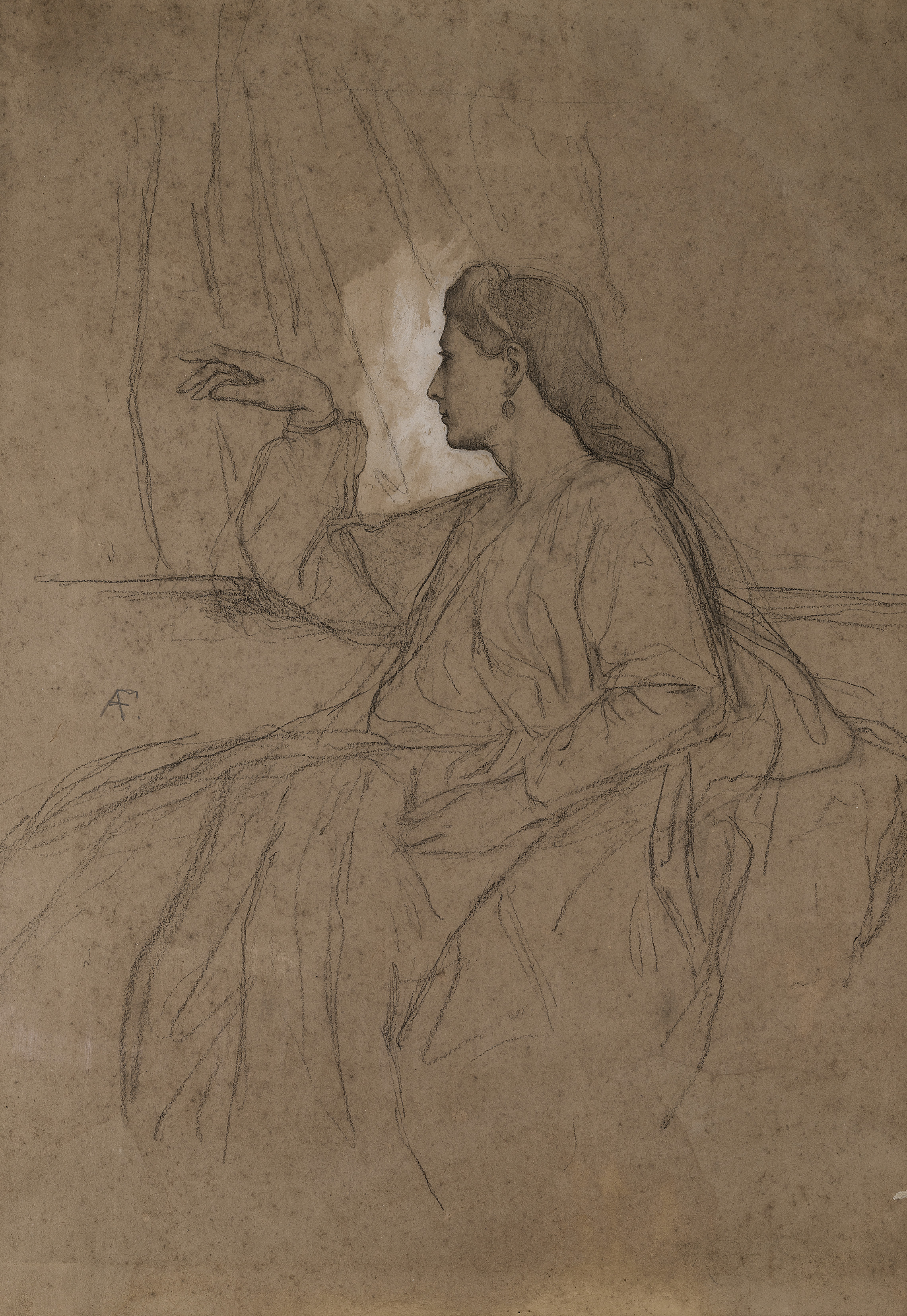 Anselm Feuerbach: Lesbia mit dem Vogel. Schwarze Kreide und weiße Höhung auf bräunlichem Papier, 40,5 x 31,5 cm, links mittig monogrammiert.